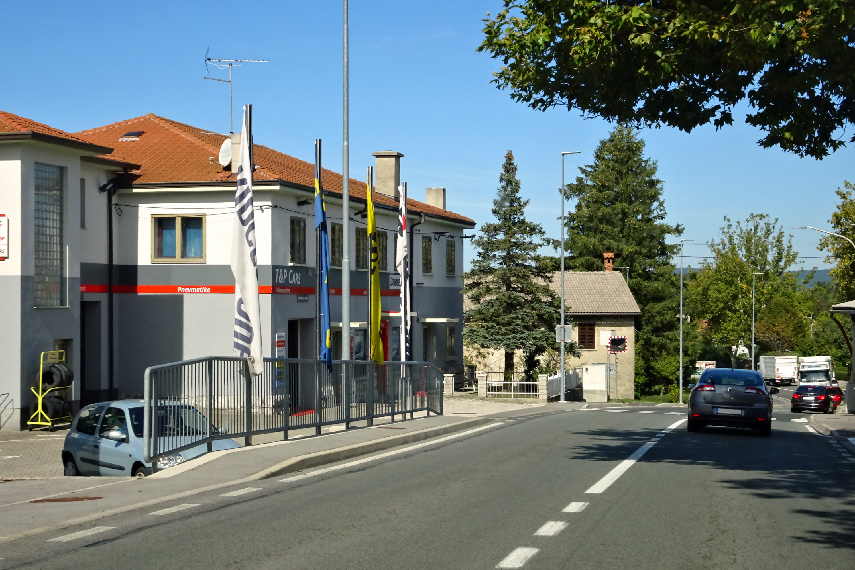 Materija, Municipality of Hrpelje-Kozina, Slovenia